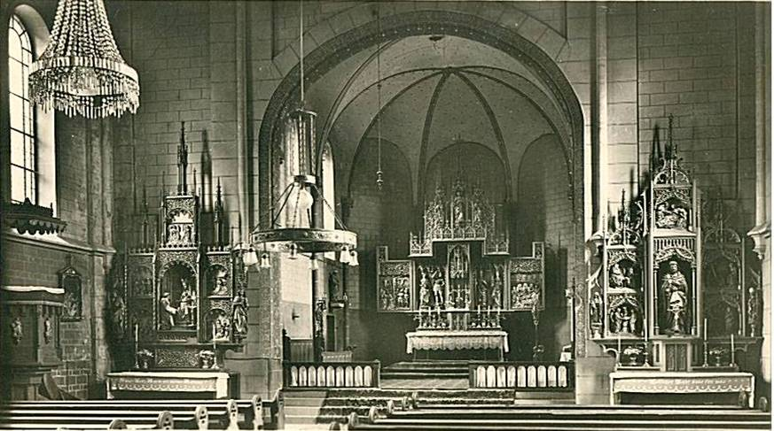 Innenansicht der Pfaffenwiesbacher Georgskirche (1952)